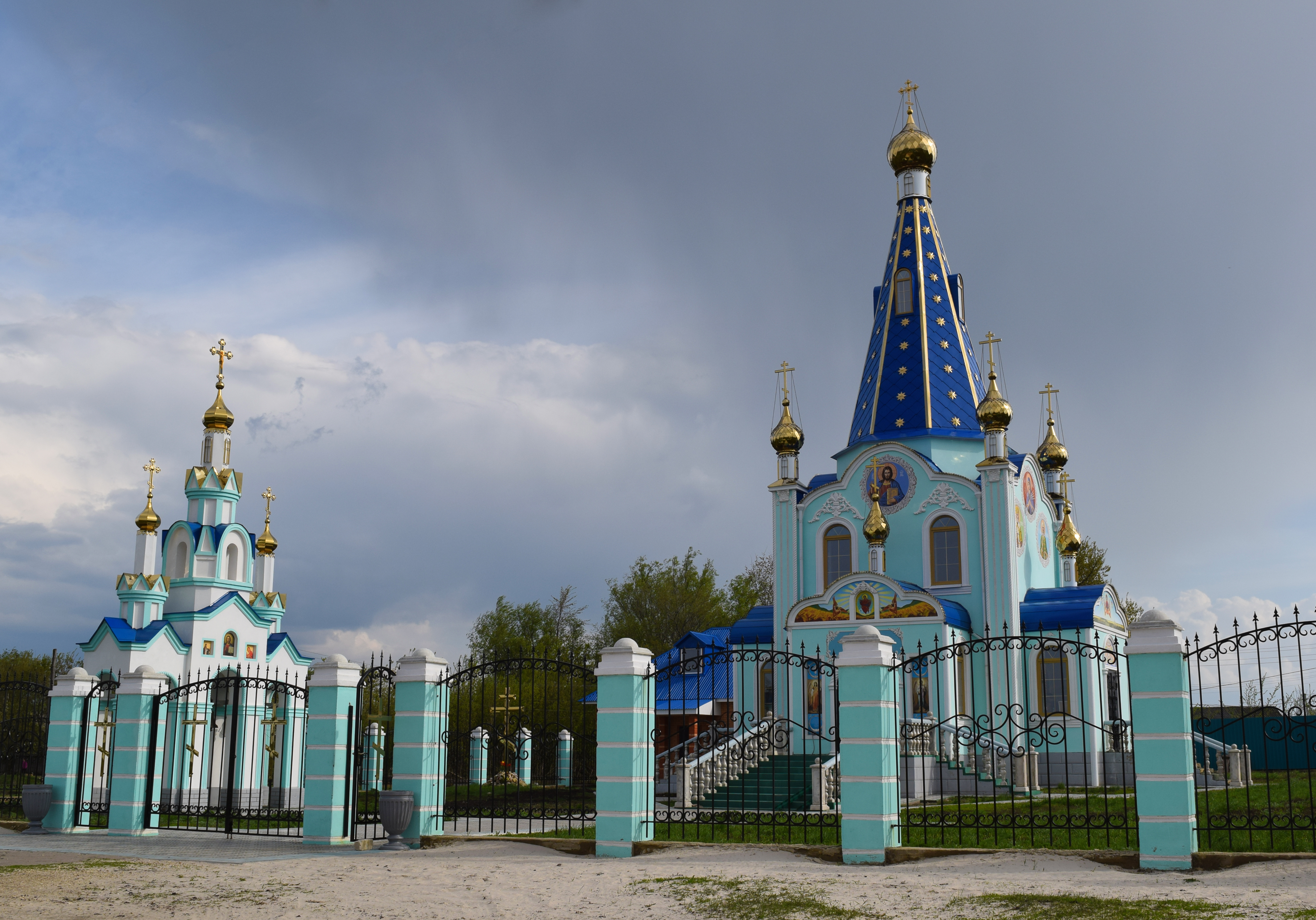 пос. Южный, Милославский район, Рязанская область